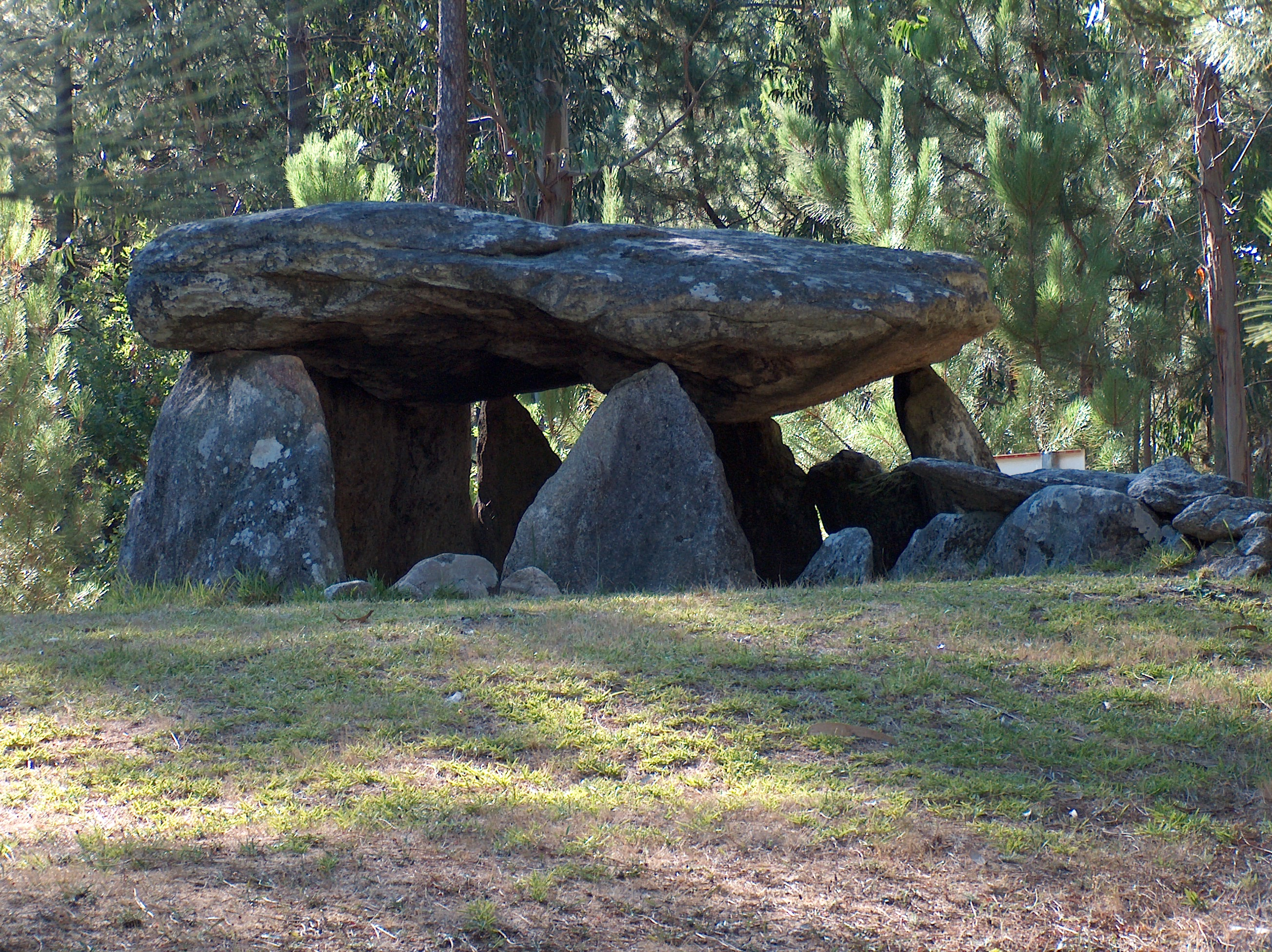 Descrição Imagem da anta da Cerqueira, na freguesia de Couto de Esteves, no concelho de Sever do Vouga, em Portugal. (imagem 2) Fonte Carregada pelo autor Autor João Carvalho